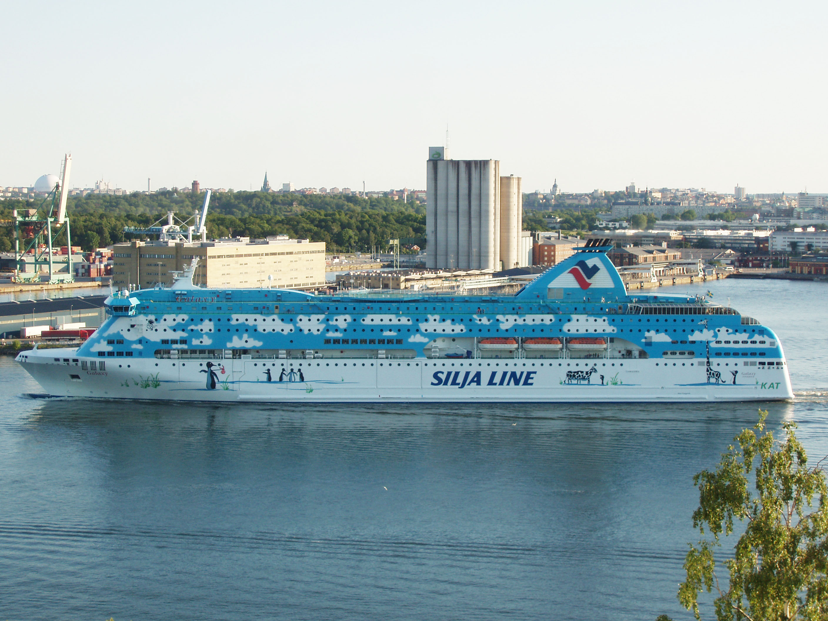 M/S Silja Galaxy på ut ur Värtahamnen i Stockholm.